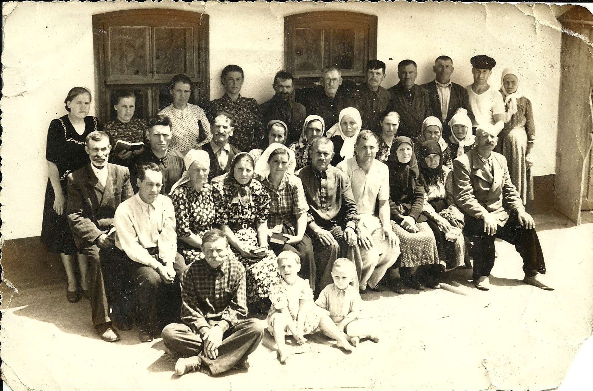 Церква євенгельських християн баптистів у Косовці, Білгород-Дністровський район Одеської області